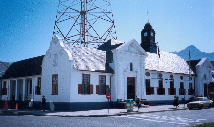 FC Georgio 1991 Ville de George en Afrique du Sud